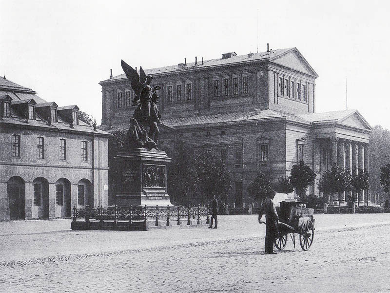 Großherzogliches Hoftheater um 1896, das 1944 zerstört wurde und erst 1994 wieder eröffnet wurde